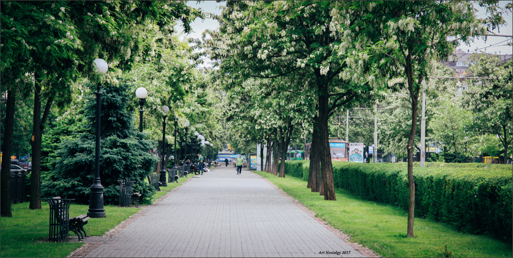 бульварна частина навпроти міськради